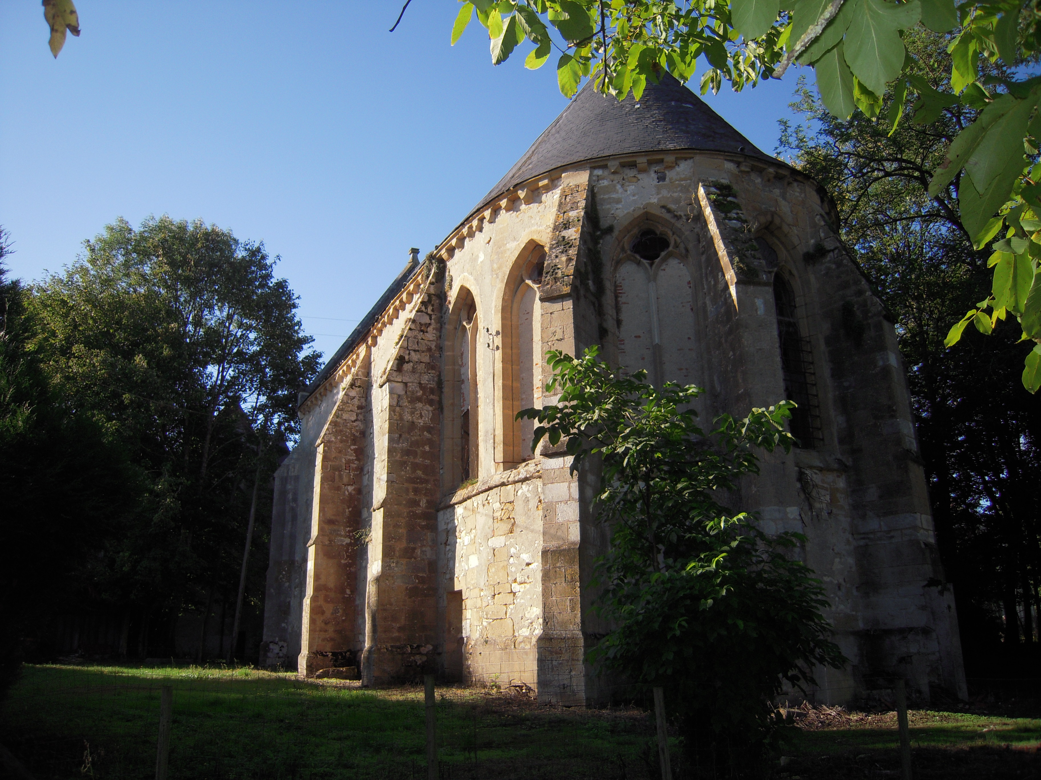 Chapelle templière, commanderie de Jussy, lieu-dit Les Bordes, Jussy-le-Chaudrier, Cher, France